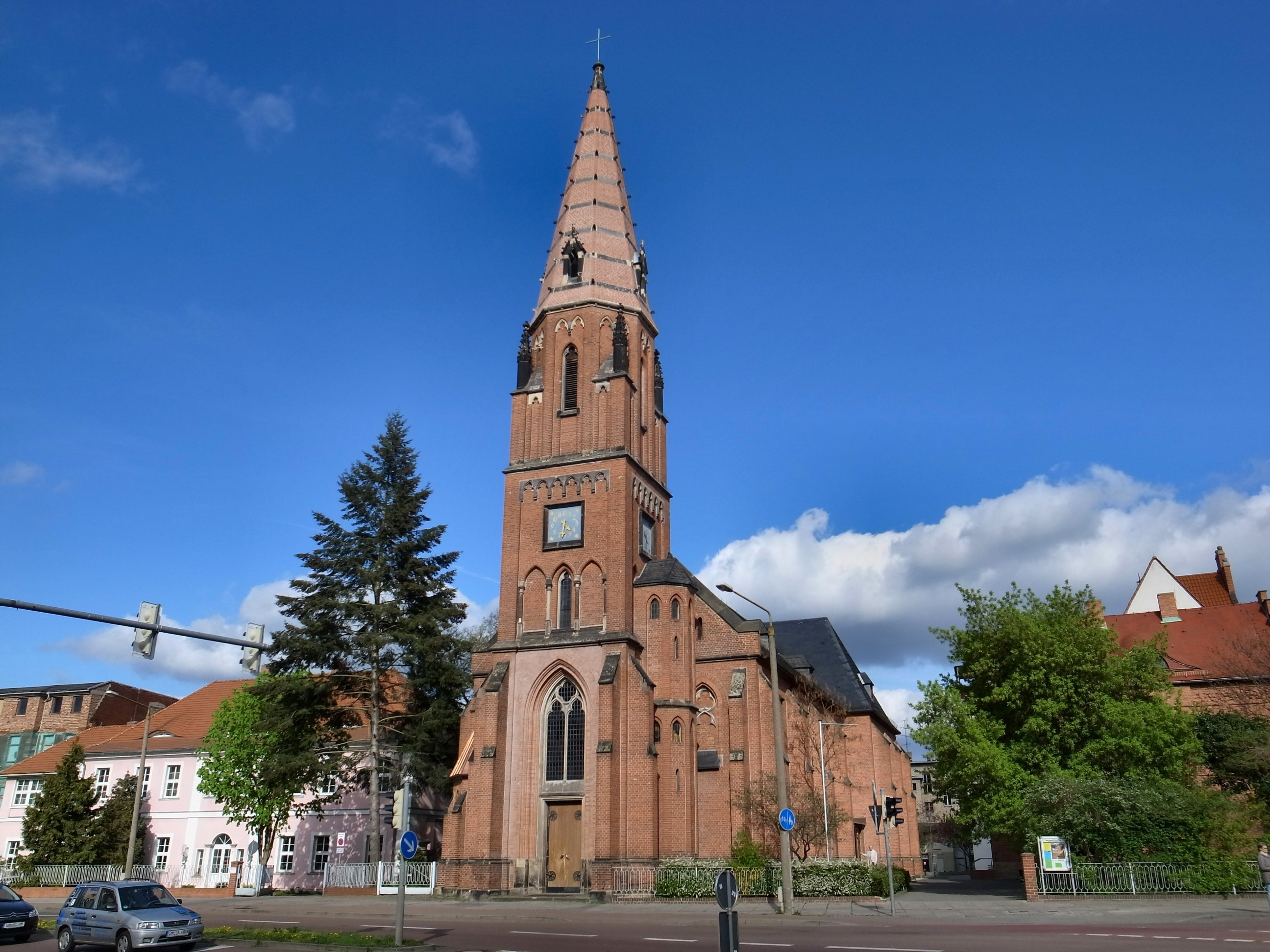 Dessau, Kirche der Kath. Gemeinde St. Peter und Paul